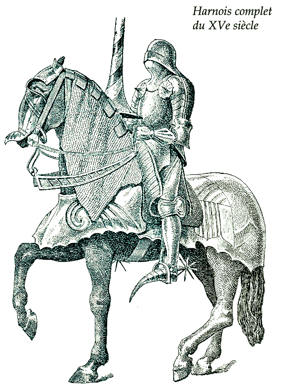 Harnois complet du XVe siècle Source scannée depuis le Larousse 1922 par Nataraja-Shiva